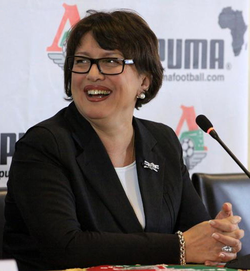 Olga Smorodskaya